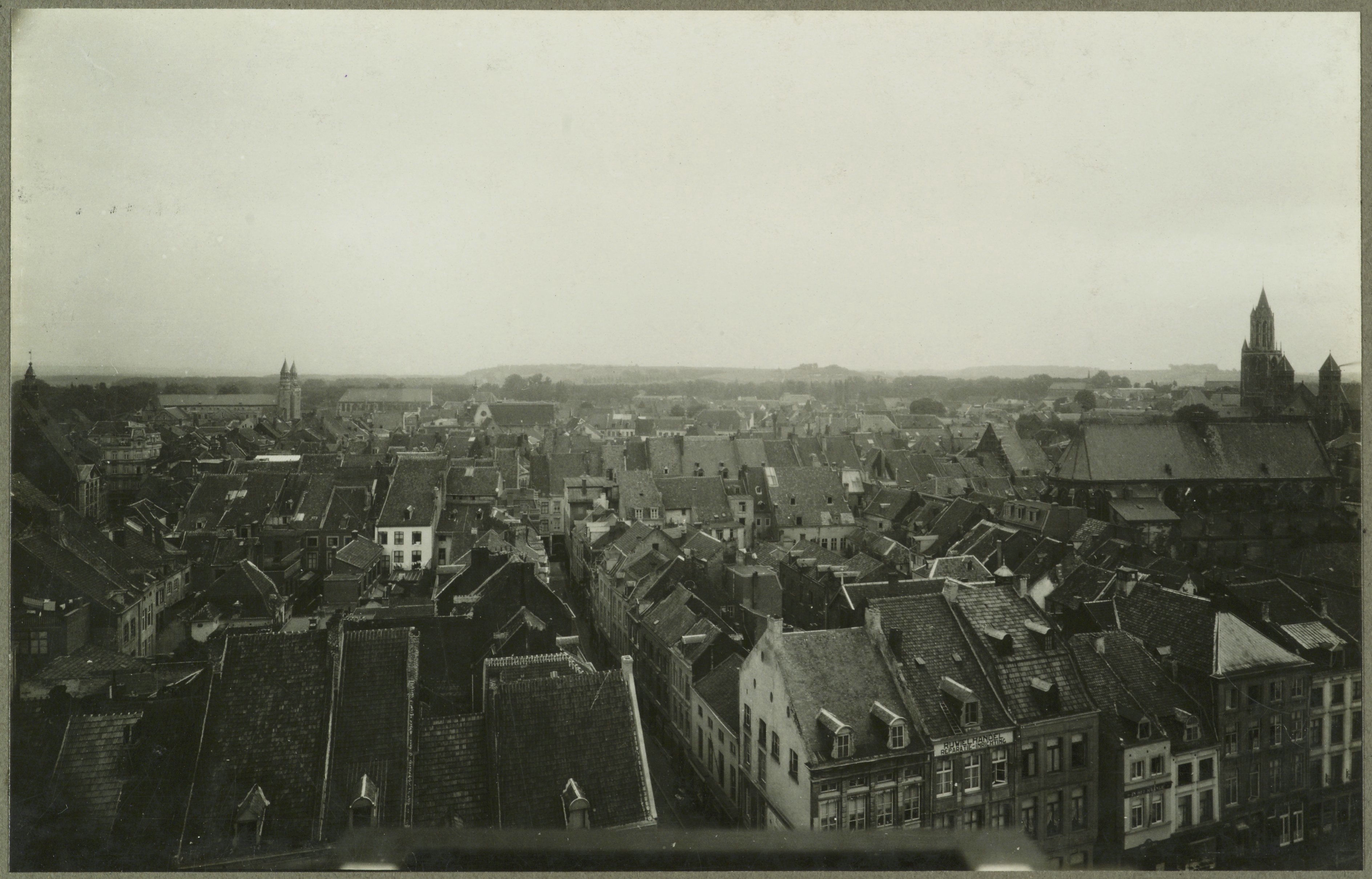 Panorama Van Af Het Stadhuis Naar Het Zuiden: Panorama